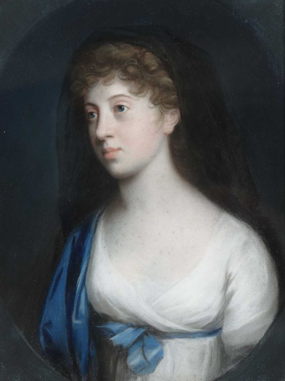 Marie Elisabeth Wilhelmine Herzogin von Braunschweig-Wolfenbüttel, geb. Prinzessin von Baden (1782-1808)